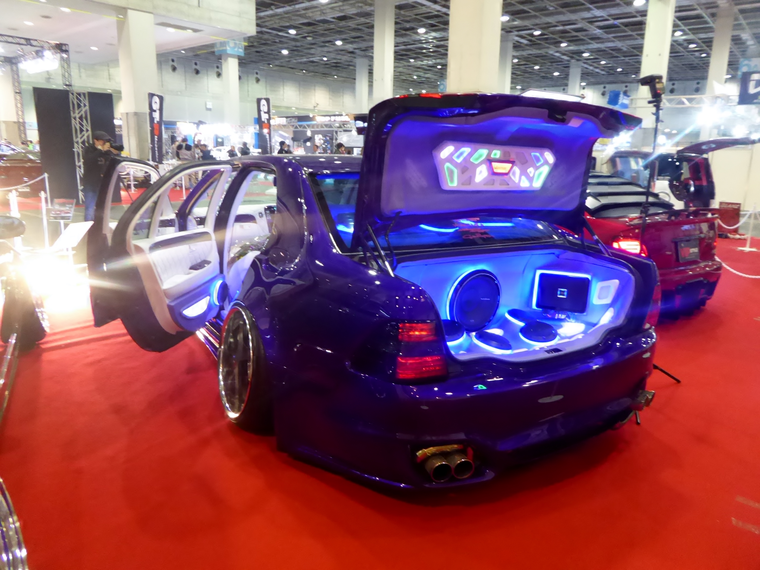 大阪オートメッセ2016においてVIP STYLEが出展するS200系トヨタ・クラウンを撮影。